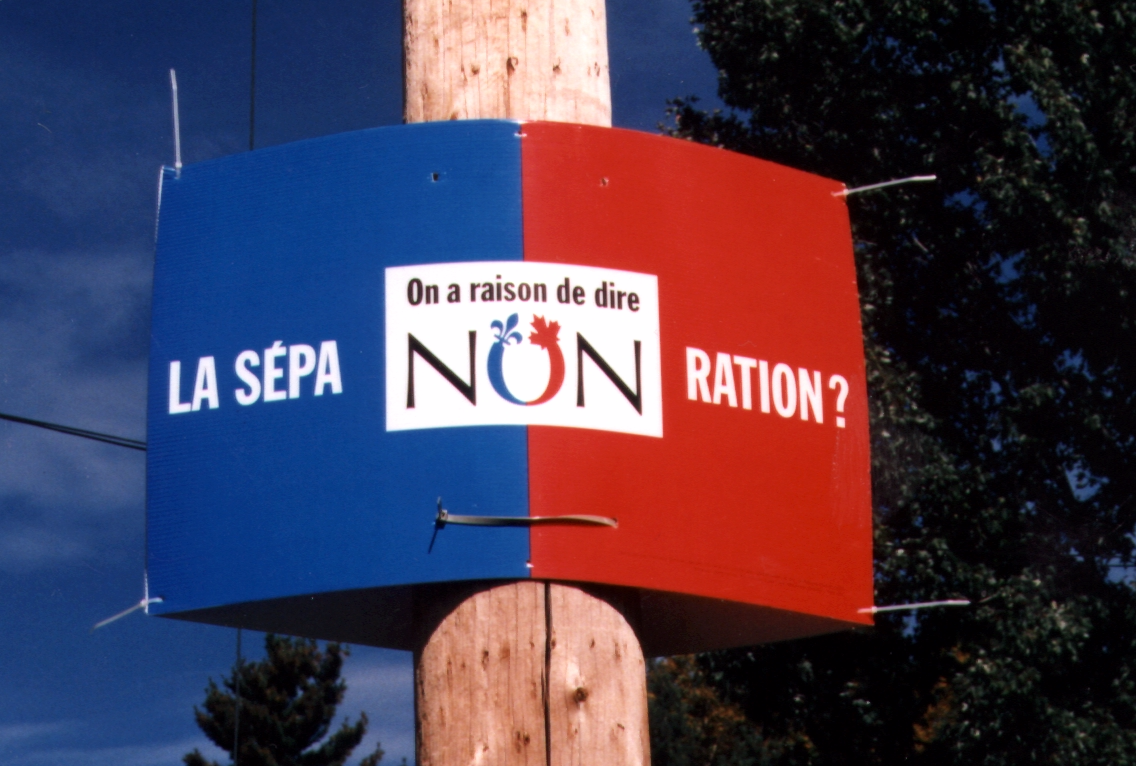 Affiche du camp du Non au référendum québécois de 1995